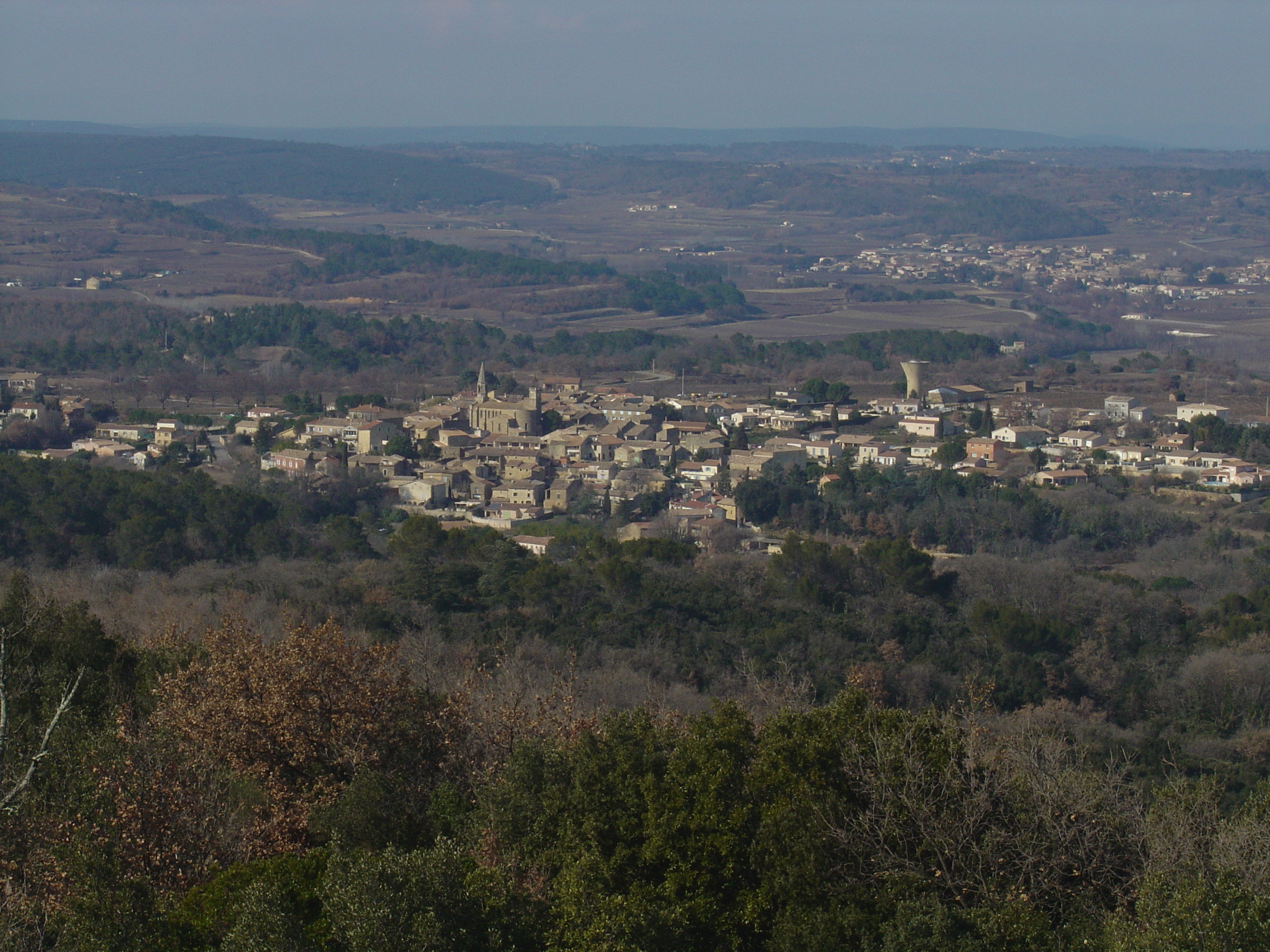 Village de Le Pin vu depuis le belvédère de la Gardie (288m)